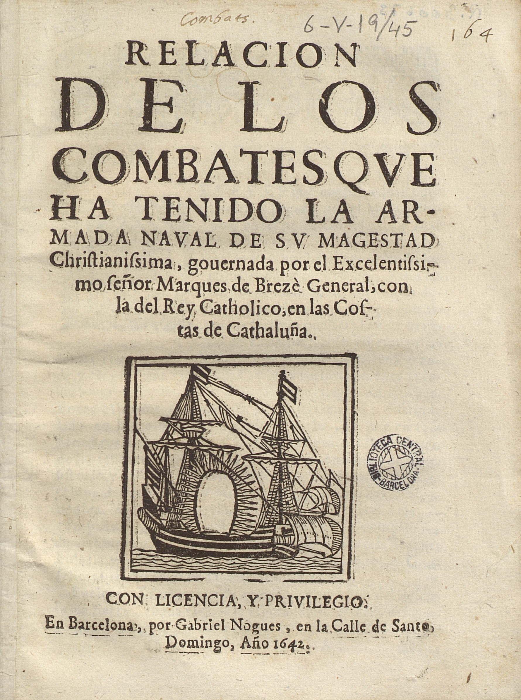 Portada de l'opuscle publicat sobre la batalla de Barcelona el mateix any que va tenir lloc. El gravat representa probablement l'incendi de la nau almirall de la Flota de França, galió de Guisa i Mare de Déu de la Victòria.